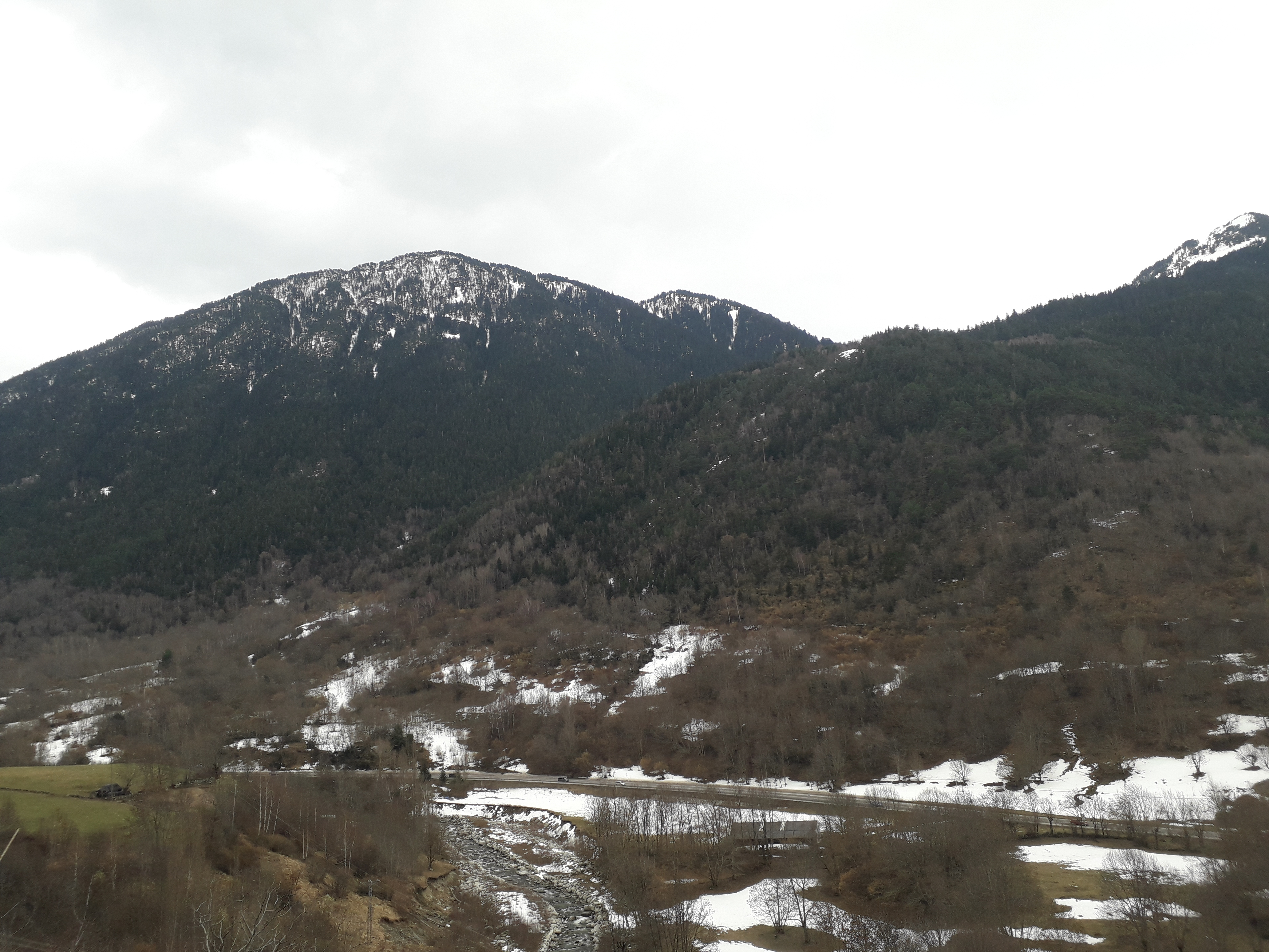 Montaña des Malh des Vivèrs de 2.154 metros situada en el Valle de Arán, Cataluña (España)